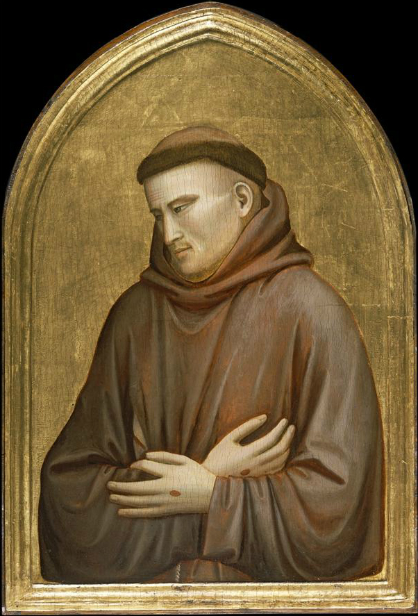 Giotto, polittico peruzzi 02 san francesco